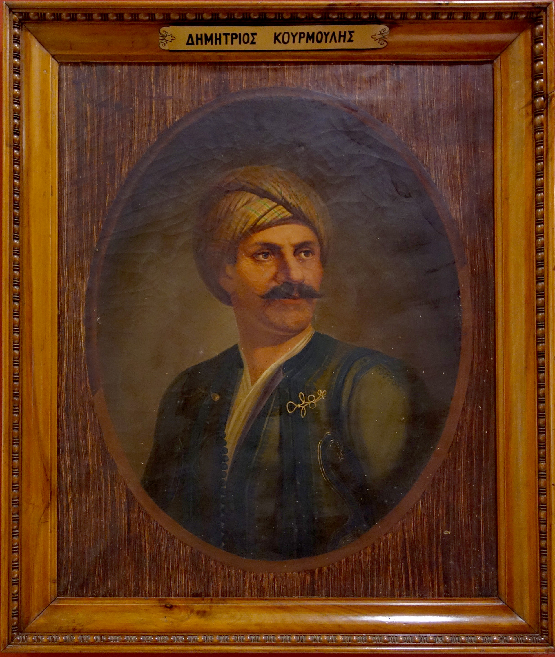 Δημήτριος Κουρμούλης. Ήταν γιος του αρχηγού της σημαντικής οικογένειας των Κουρμούληδων, Μιχαήλ. Μετά τον θάνατό του πατέρα του το 1824, ανέλαβε την αρχηγία της οικογένειας.